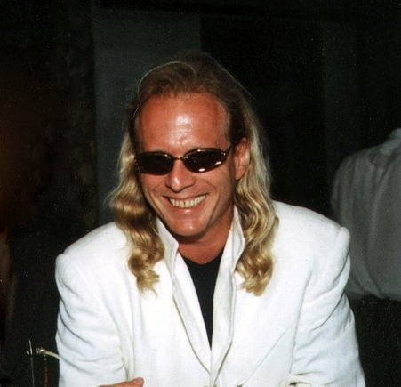 Крис Кельми (он же Анатолий Арьевич Кельми )